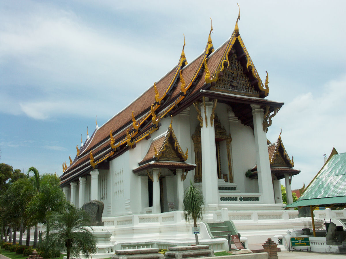 Wat Na Phra Men (วัดหน้าพระเมรุ), Ayutthaya, Thailand